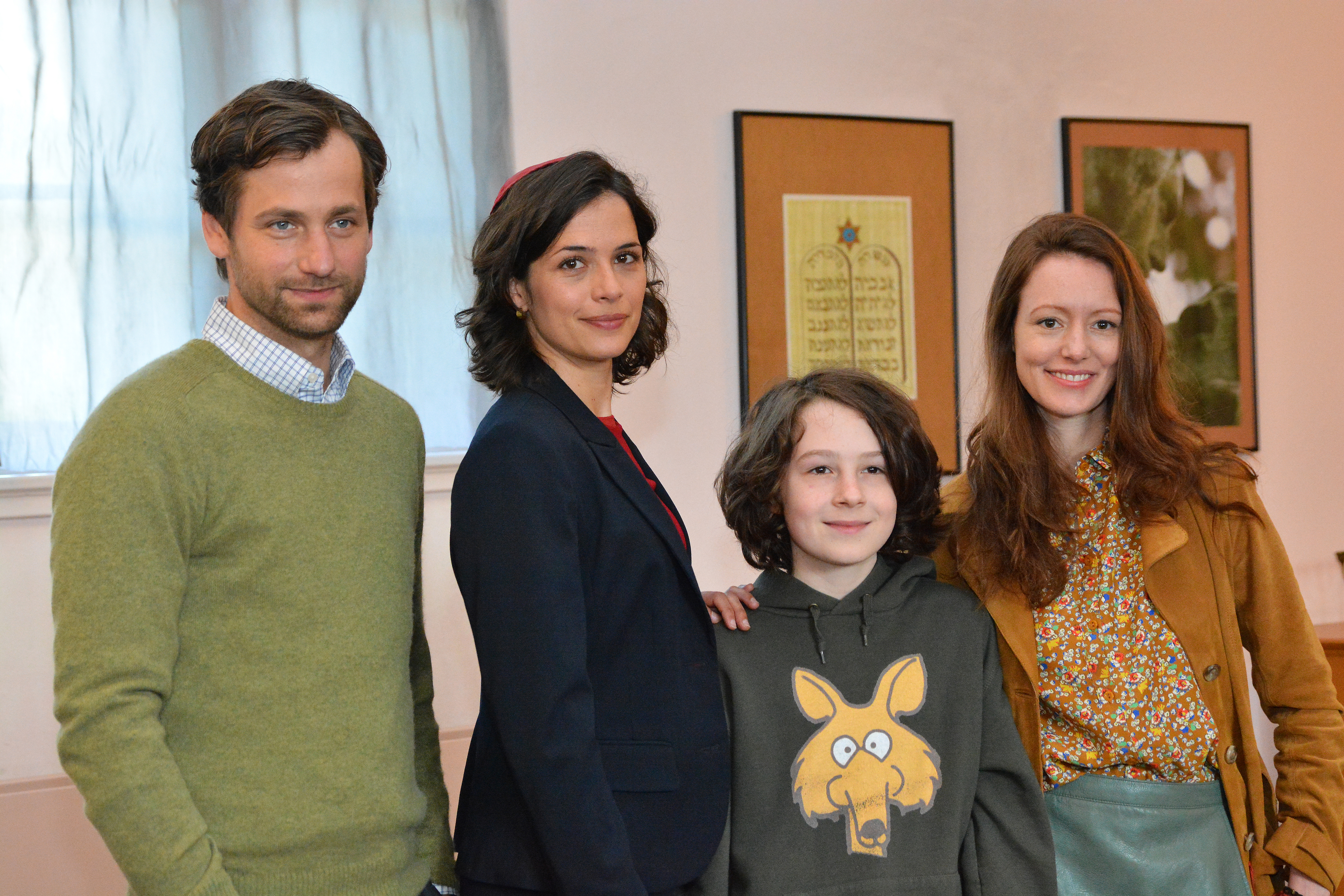 Die Hauptdarsteller der Komödie Simon sagt auf Wiedersehen zu seiner Vorhaut bei einem Fototermin von links nach rechts: Florian Stetter (Frank) Catherine De Léan (Rebecca) Maximilian Ehrenreich (Simon) Lavina Wilson (Hannah)